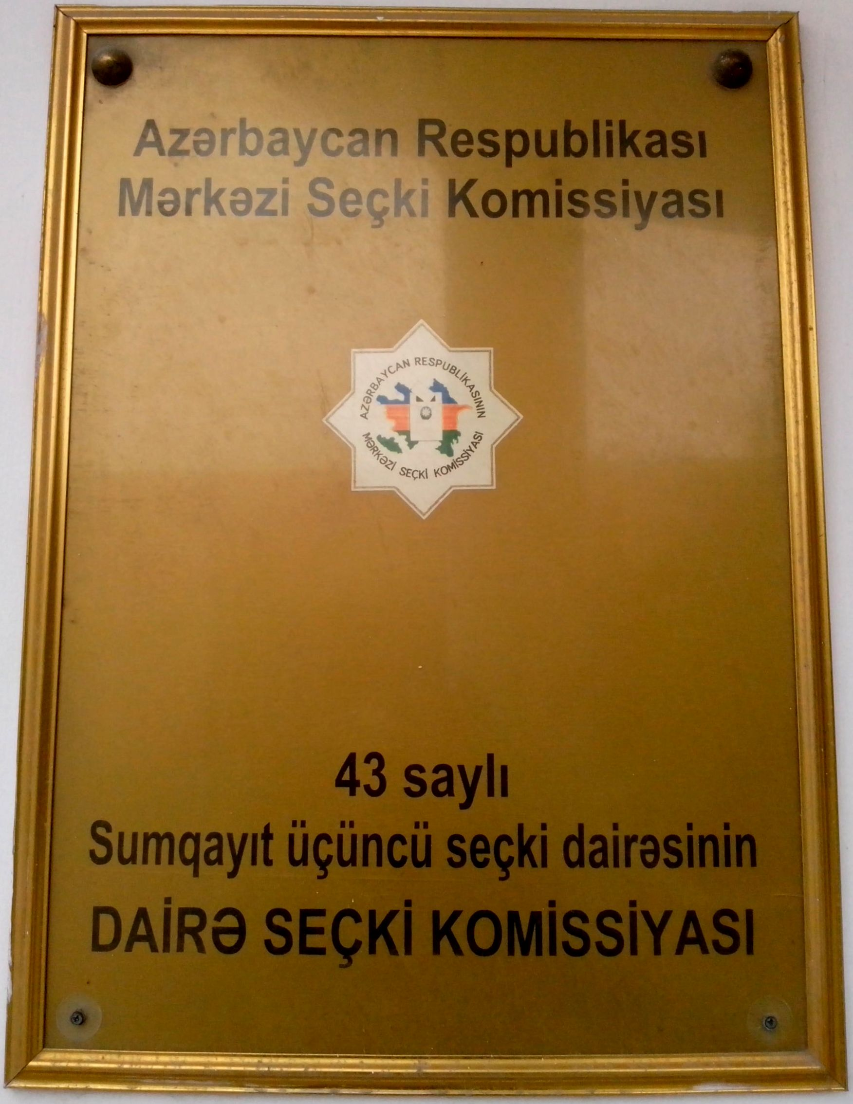 43 saylı Sumqayıt üçüncü seçki dairəsinin Dairə Seçki Komissiyası